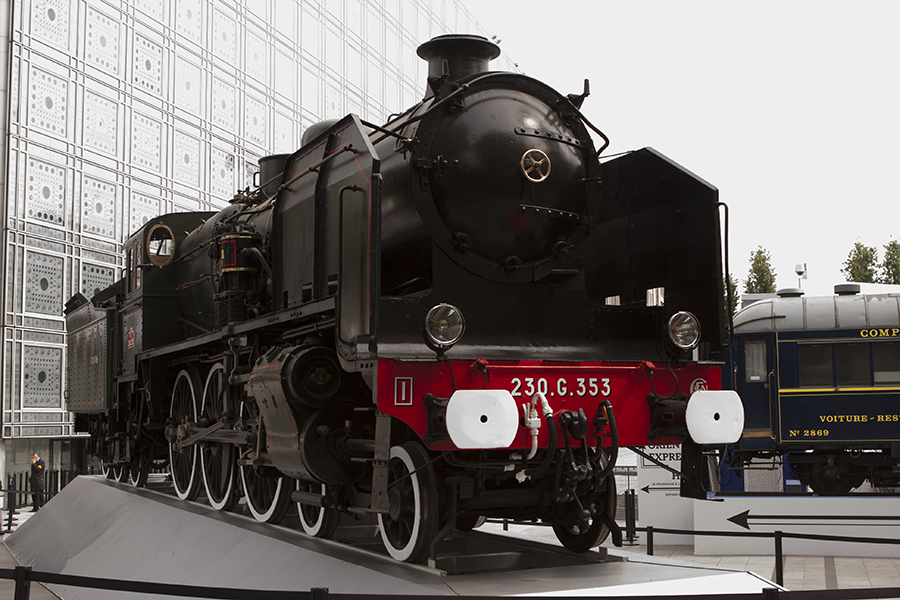 Exposition Paris Institut du Monde Arabe Avril 2014